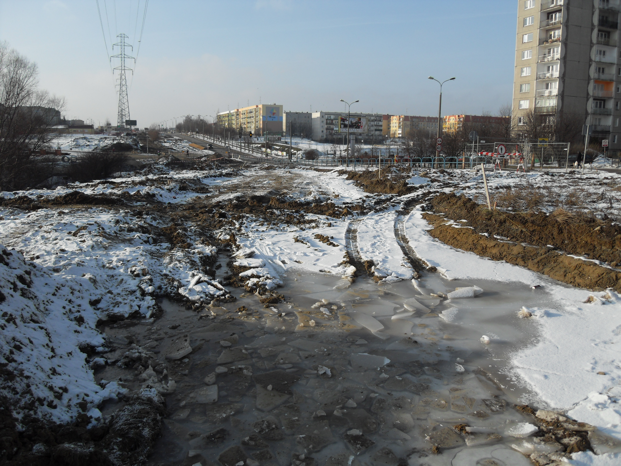 Gdańsk Chełm, ul. Witosa - budowa linii tramwajowej do osiedli Ujeścisko i Orunia Górna.